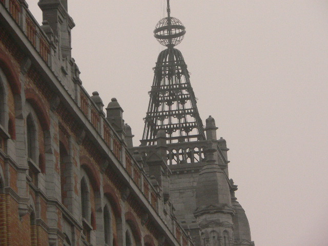 Tour et Taxi - Photo personnelle de l'utilisateur mario SCOLAS